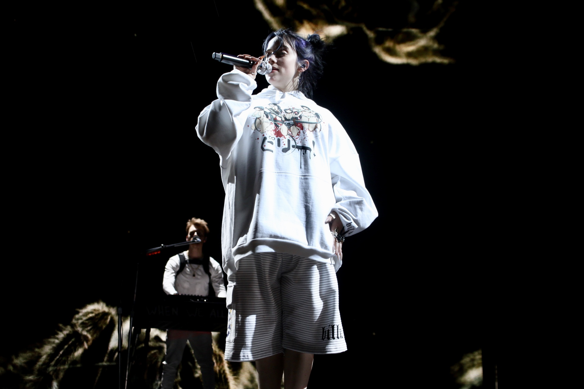 Billie Eilish ::: Red Rocks::: 06.05.19